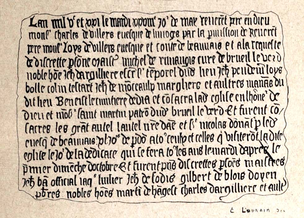 Plaque commémorative de la 2e consécration en 1521, transcription par Ernest Laurain.